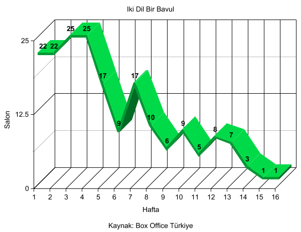 İki Dil Bir Bavul'un haftalık gösterildiği sinema salonlarını gösteren grafik.